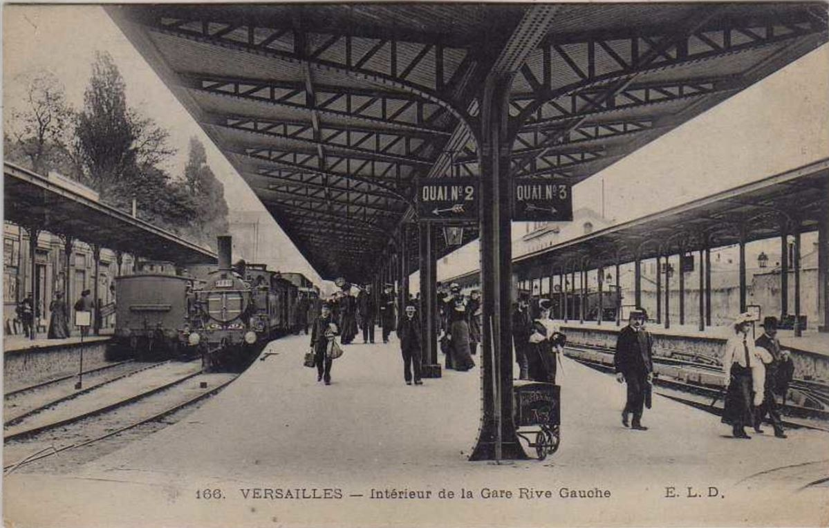 Carte postale du début du XXe siècle montrant l'intérieur de la gare de Versailles rive gauche avec les quais sur lesquels les passagers attendent et les locomotives à vapeur.